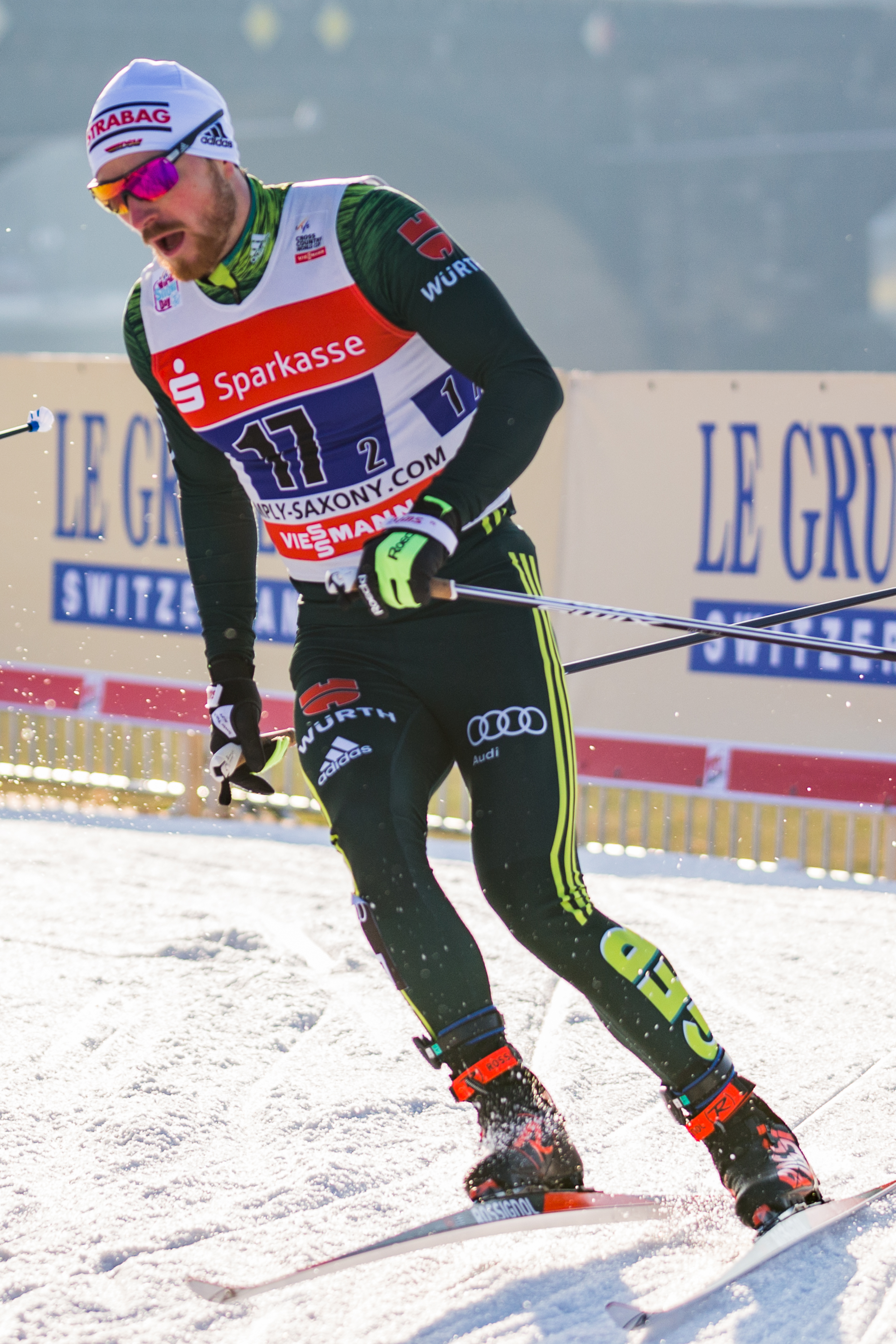 Vorläufe zum Team-Sprint; Thomas Bing (GER, Deutschland)